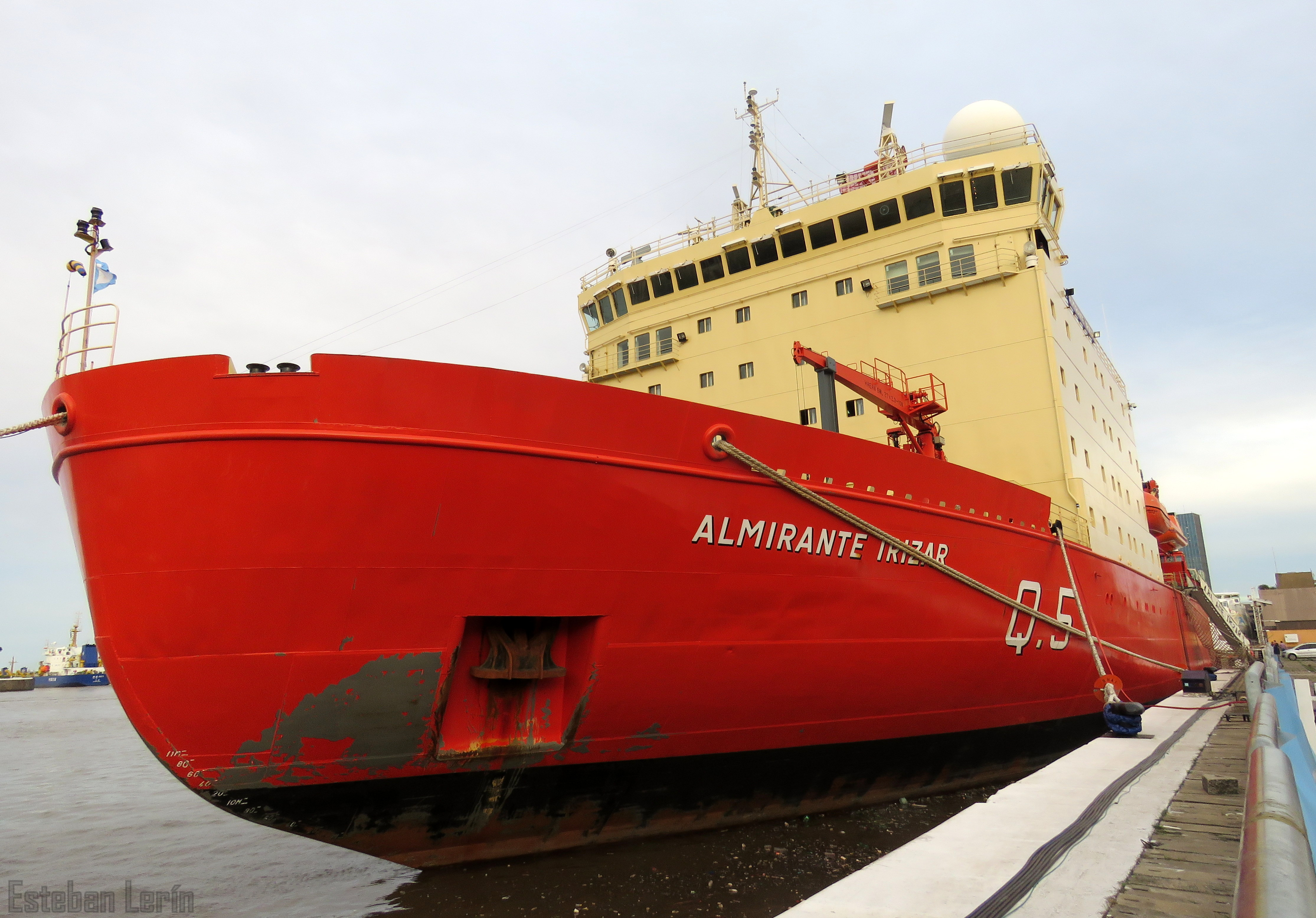 Rompehielos Ara almirante irizar en el puerto de buenos aires